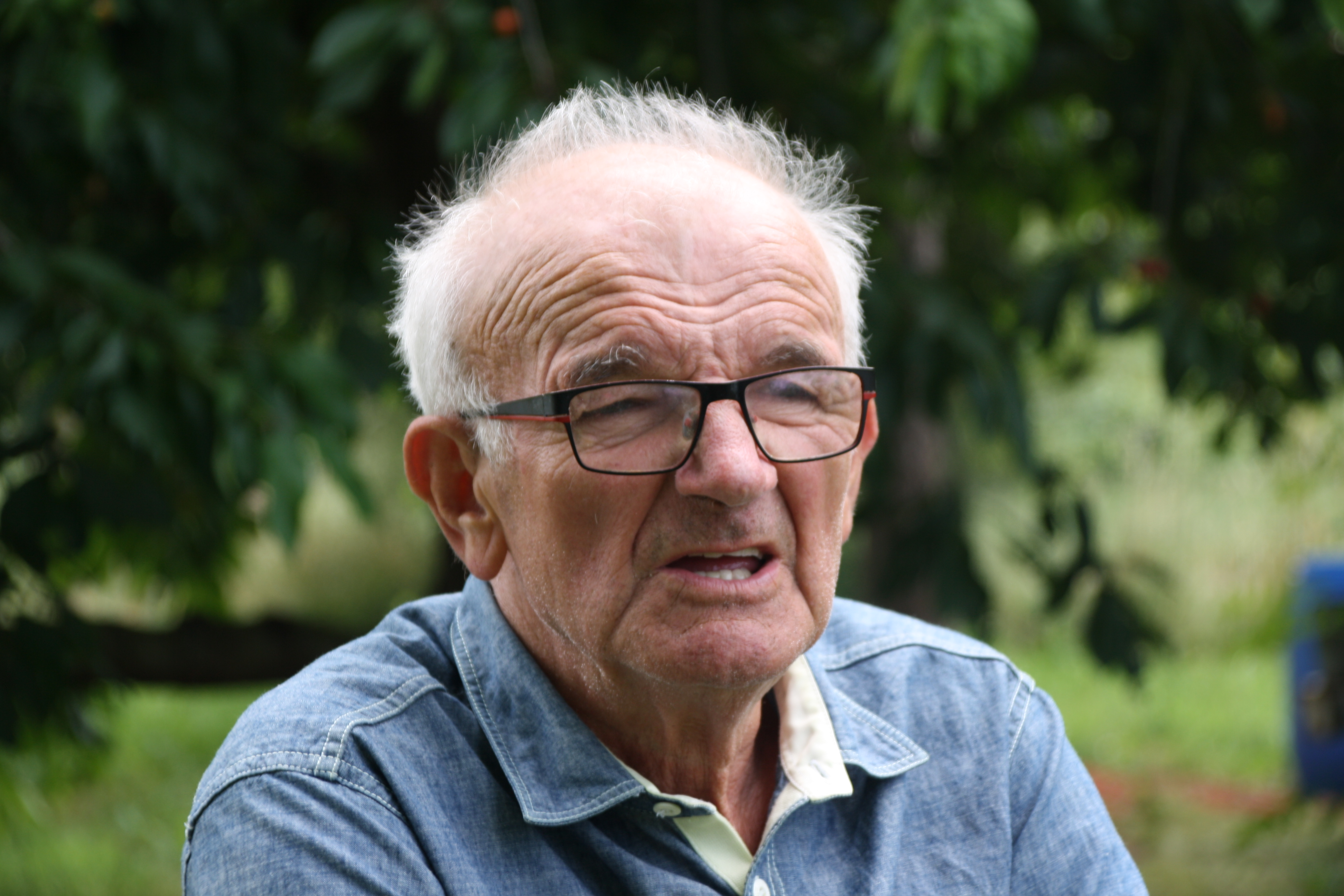 Fons Straetmans